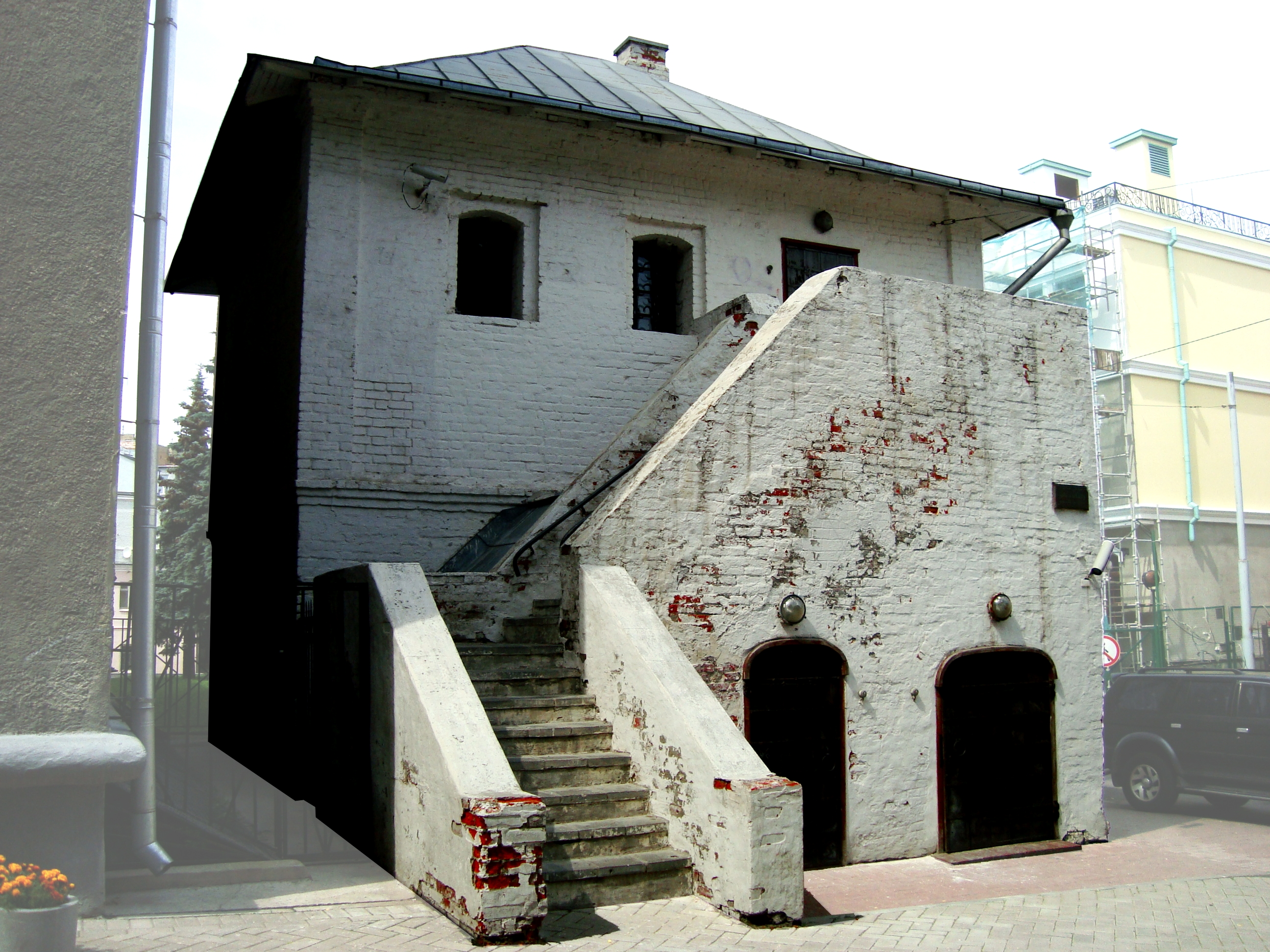 Палаты XVII века, Москва, Чертольский переулок